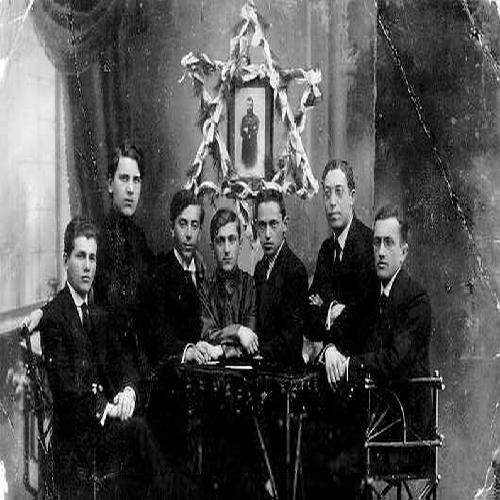 חברי הועד של מפלגת "צעירי ציון", פינסק, 1916. [תצלום של הרצל]